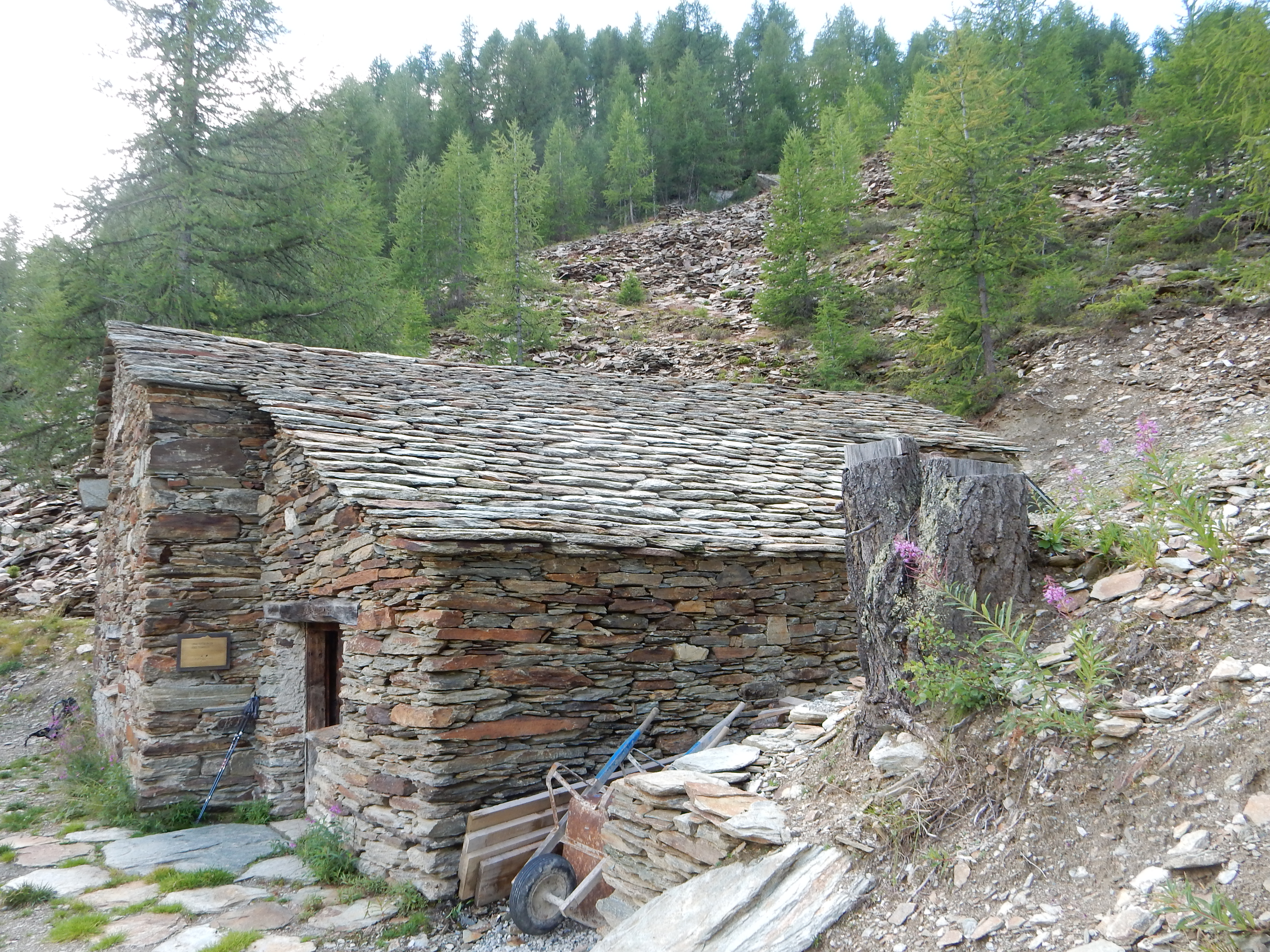 Cheva Plattas da Fex / Steinbruch der Fexerplatten: renovierte Unterkunft der Arbeiter, im Hintergrund Abräumhalden.